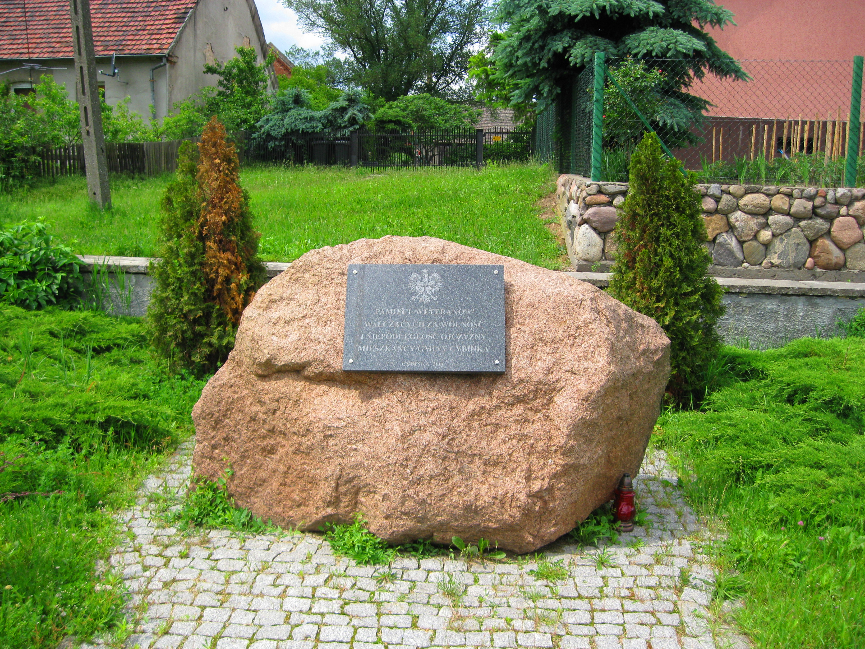 Tablica pamiątkowa w Cybince (2006).